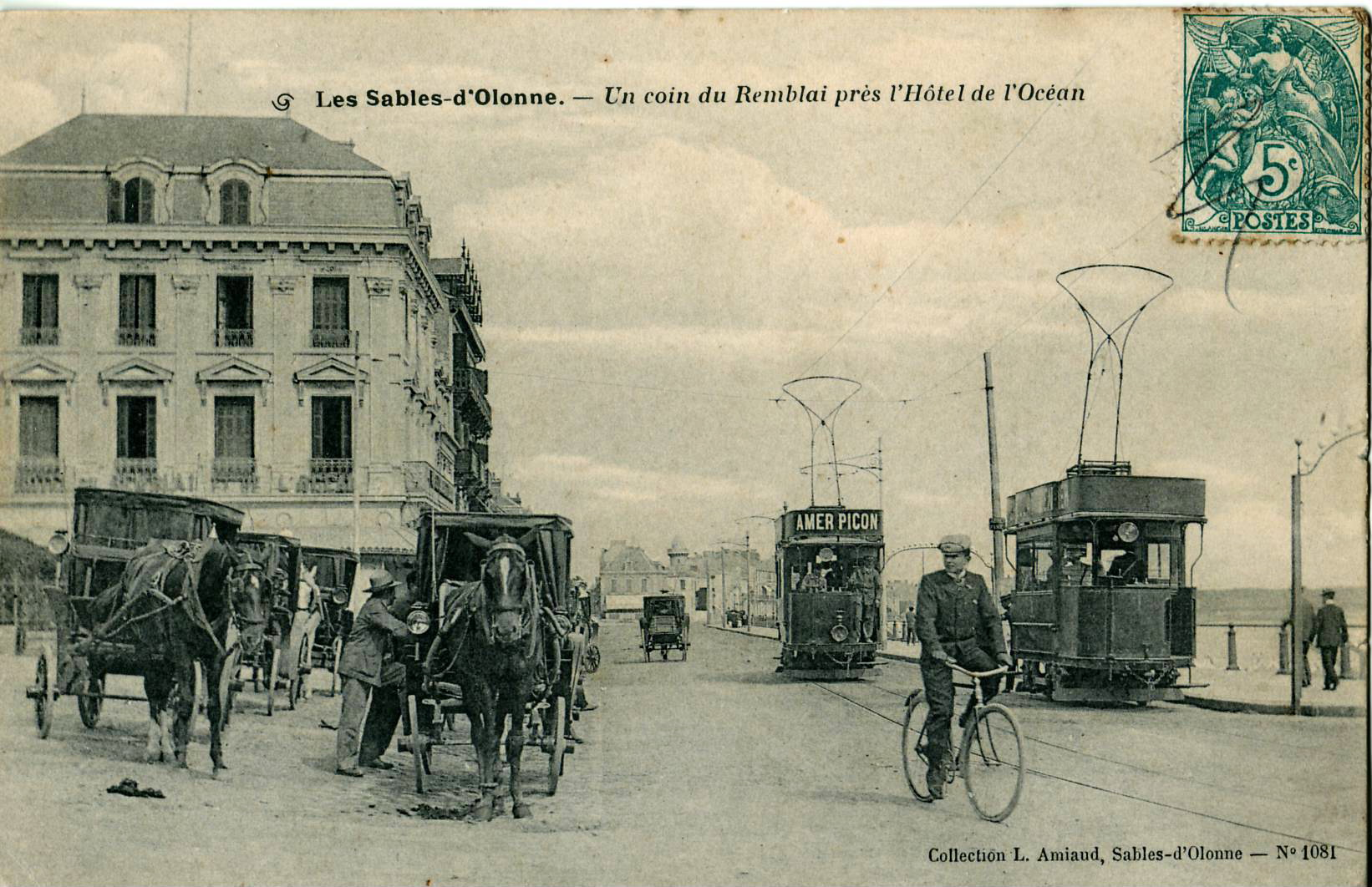 Carte postale ancienne éditée par L. Amiaud aux Sables d'Olonnes, n°1081 : LES SABLES-D'OLONNES - Un coin duRemblai près de l'Hôtel de l'Océan